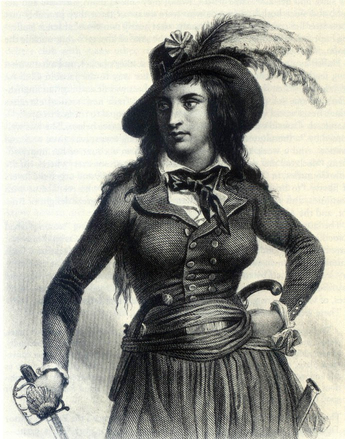 Die „Amazone der Französischen Revolution“ Théroigne de Méricourt (1762–1817)